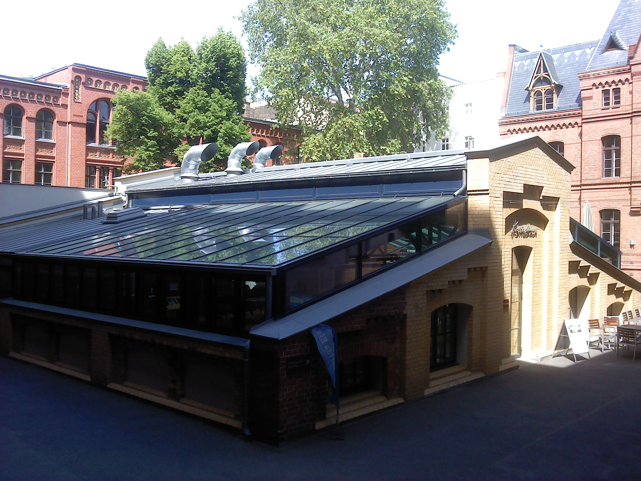 St. Hedwig-Krankenhaus: ehemaliges Kesselhaus